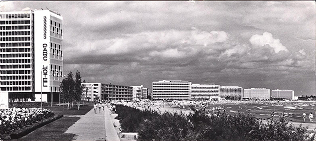 21 Hôtels et 8 restaurants, commerces, bars et clubs, 10000 places à Mamaia